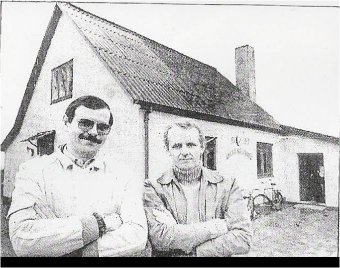 ØB Klubhus